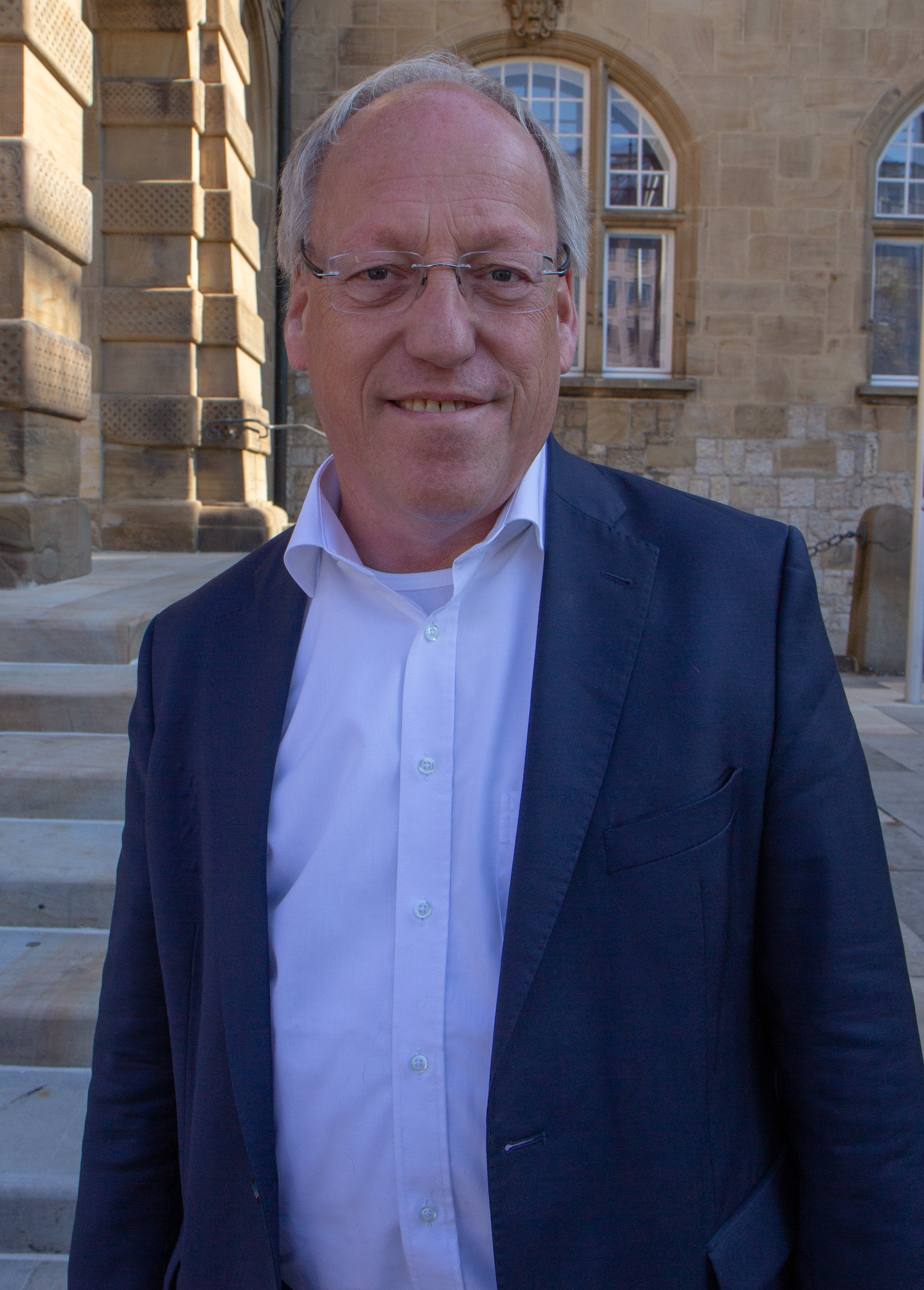 Pressetermin am Set "Wilsberg" am Alten Rathaus in Bielefeld am 15. Oktober 2018.